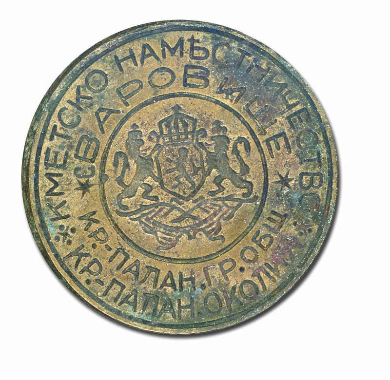 Отпечатък от печат на българската община във Варовище, днес Република Македония.